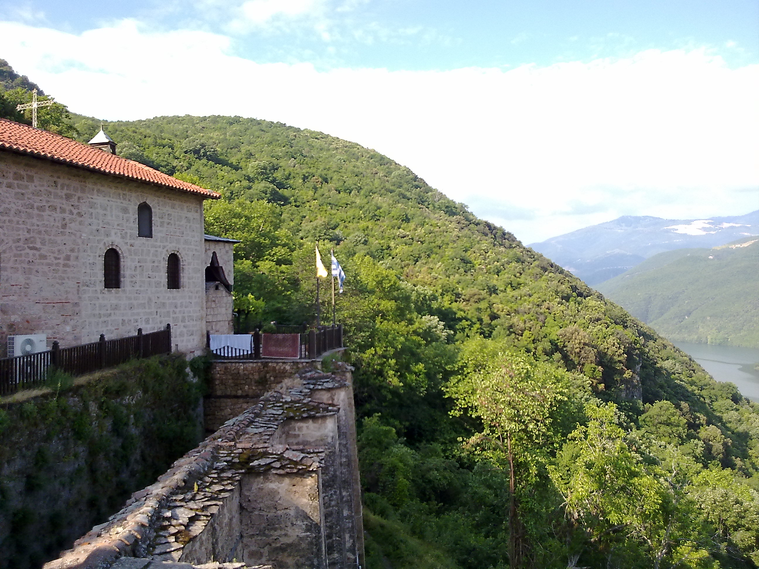 Ιερά Μονή Τιμίου Προδρόμου Βέροιας